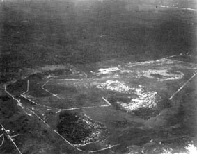 Aeródromo de Salvador no início dos anos 1930